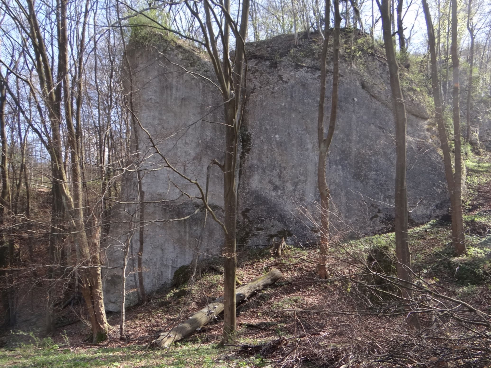 Garncarskie Skały w wylocie wąwozu Jamki do Doliny Sąspowskiej